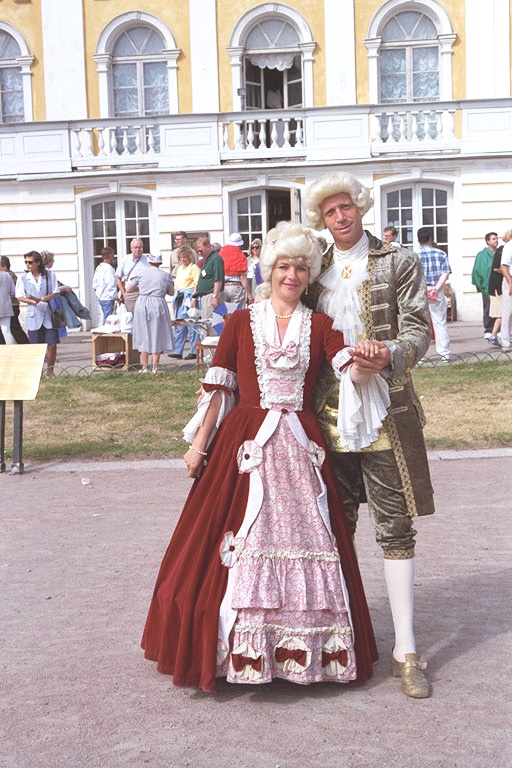 Truechten virum Peterhof, Summerpalais vun den Tsaren